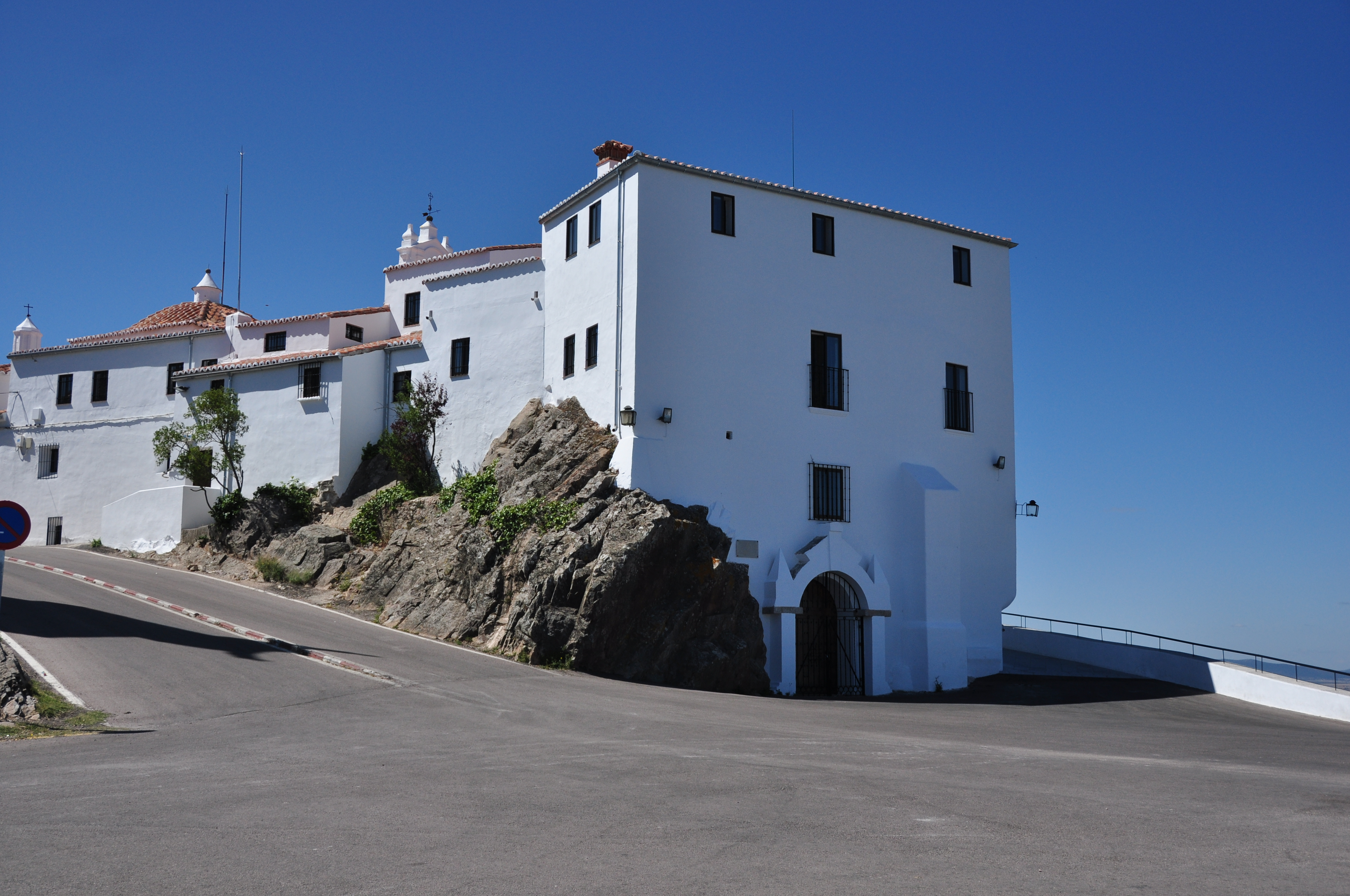 Fachada del Santuario de Nuestra Señora de la Montaña, Cáceres.